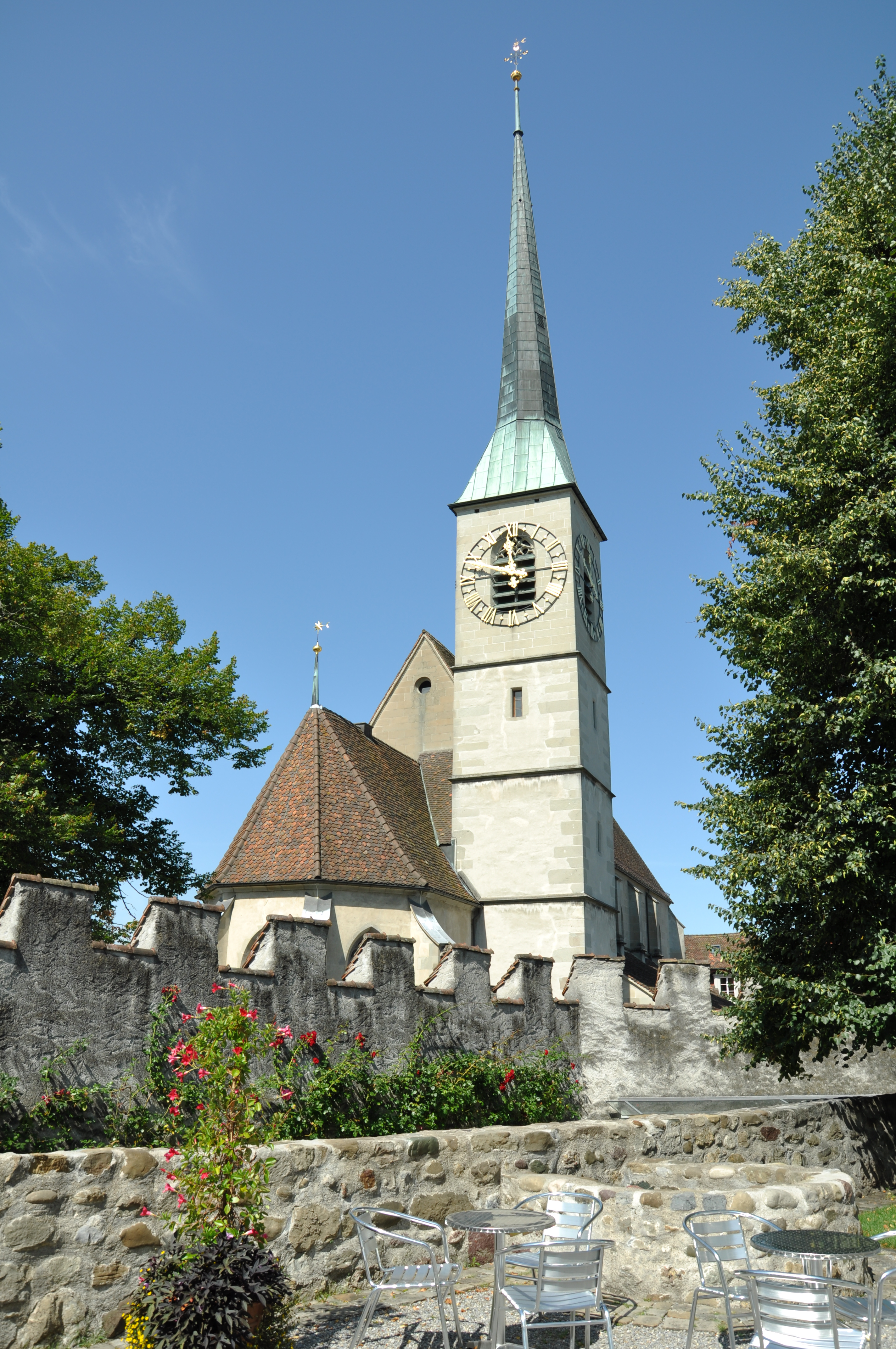 Zug Katholische Kirche St. Oswald